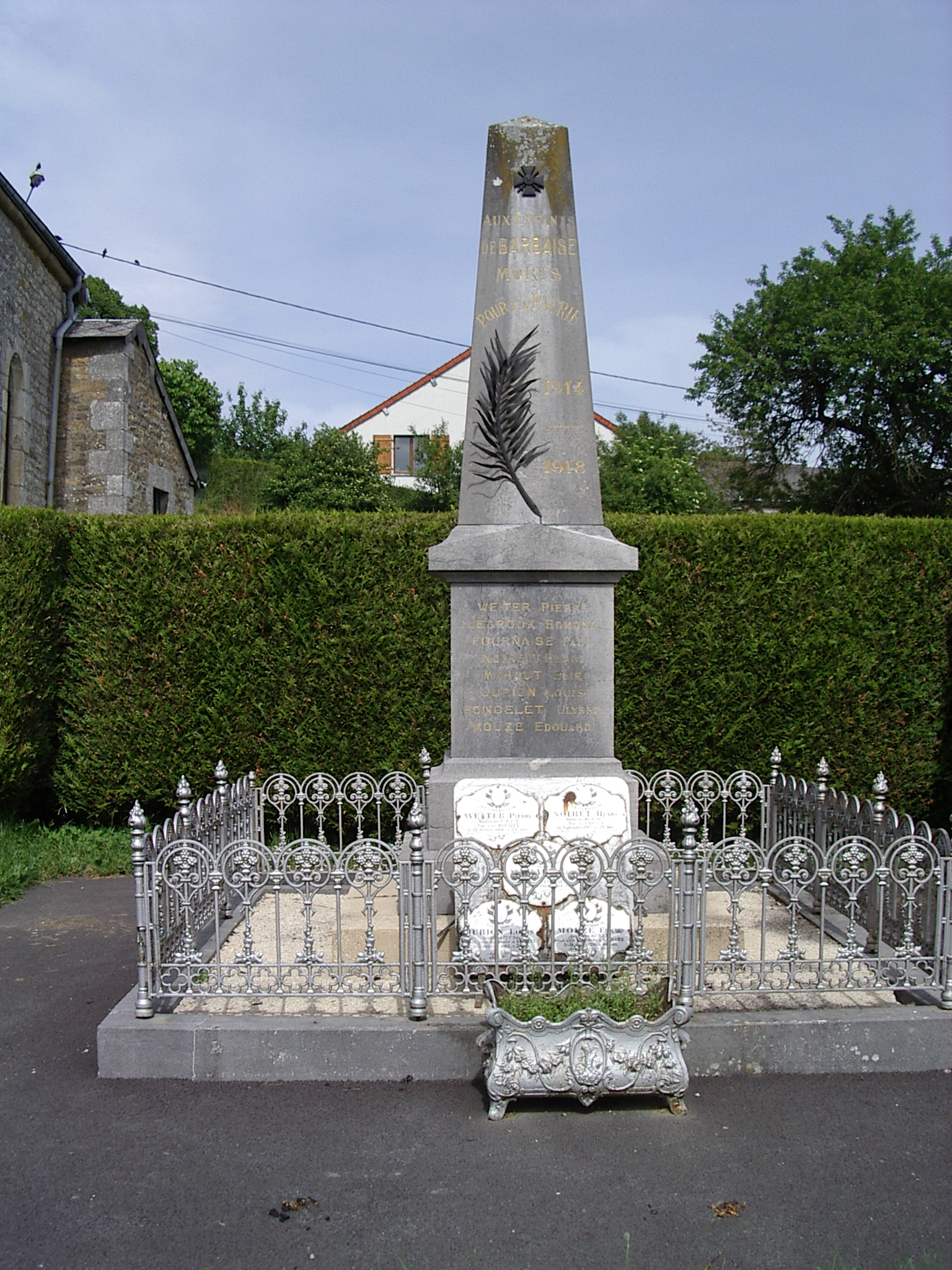 Barbaise est une commune française, située dans le département des Ardennes et la région Champagne-Ardenne-Monument aux morts